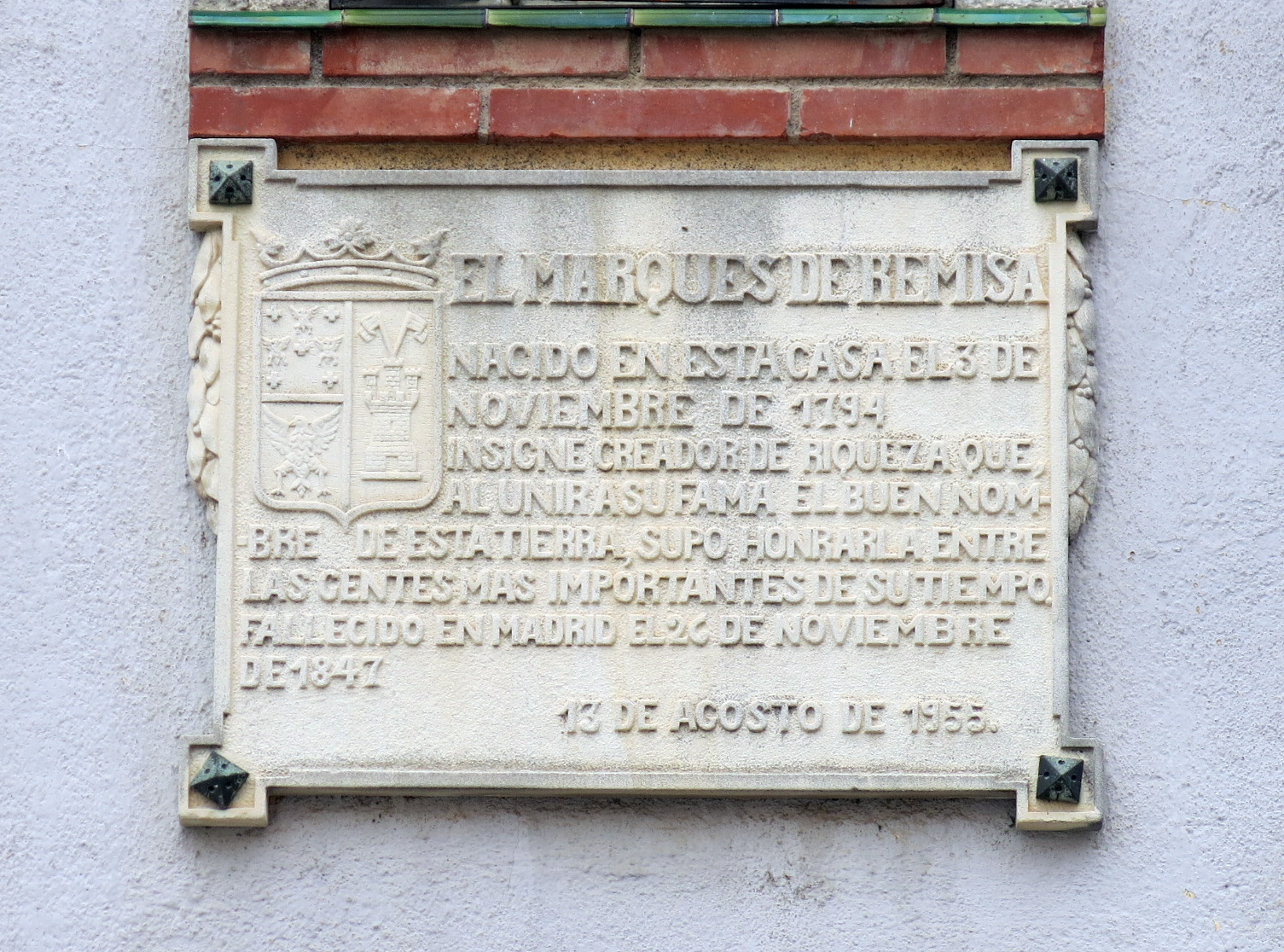 Placa commemorativa del naixement del marquès Gaspar de Remisa a Sant Hipòlit de Voltregà, a la seva casa natal de l'avinguda Francesc Macià.